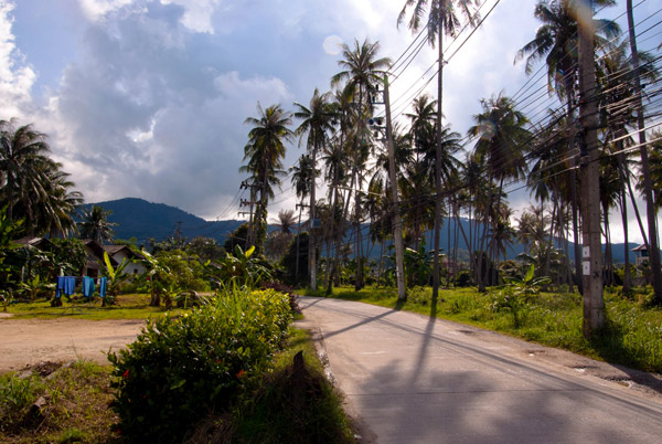 Дороги Самуи